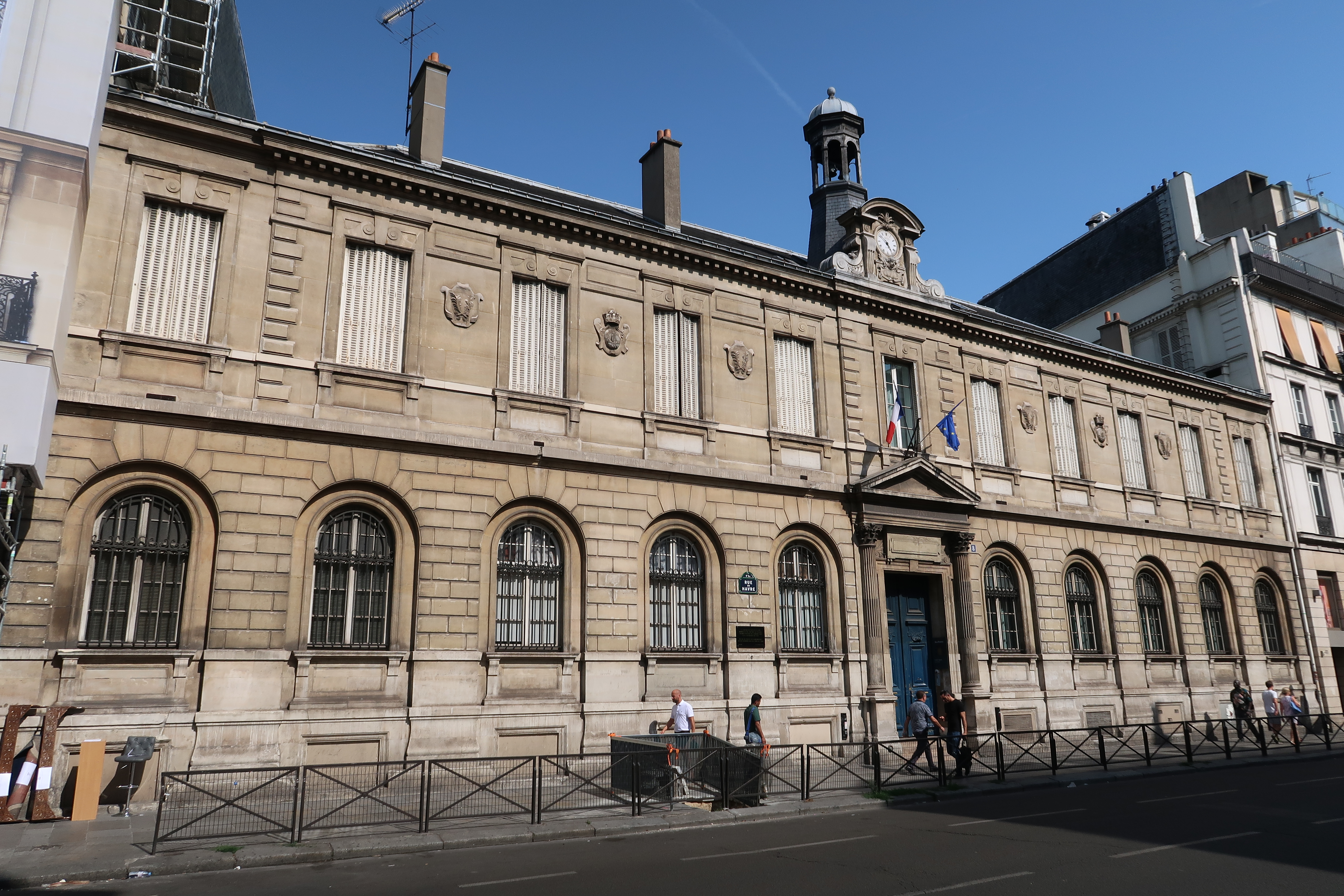 Lycée Condorcet, 8 rue du Havre (Paris, 9e).